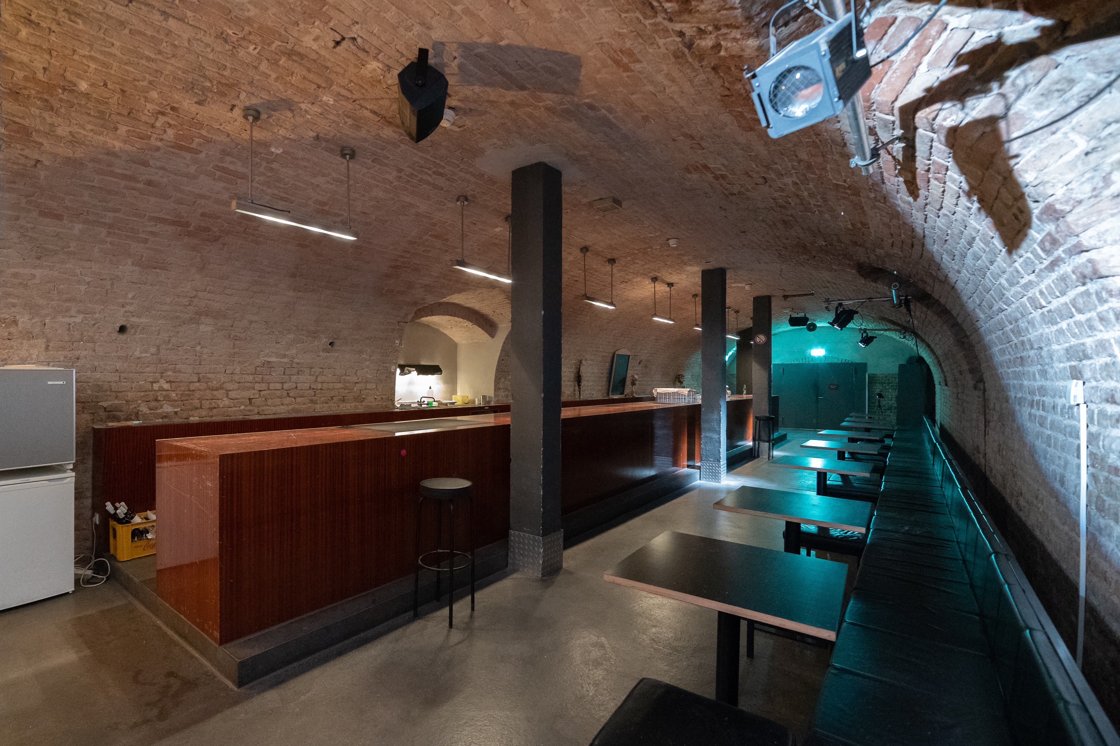 Foyer des Kellers mit der längsten Theke Augsburgs.